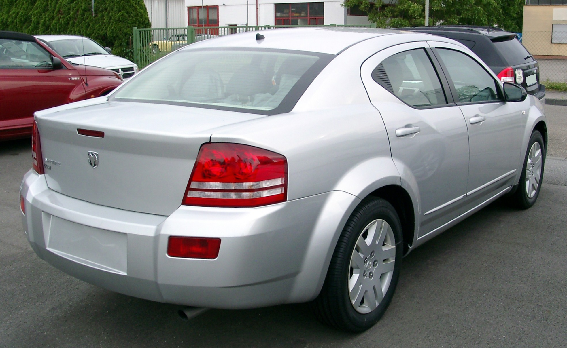 Dodge Avenger